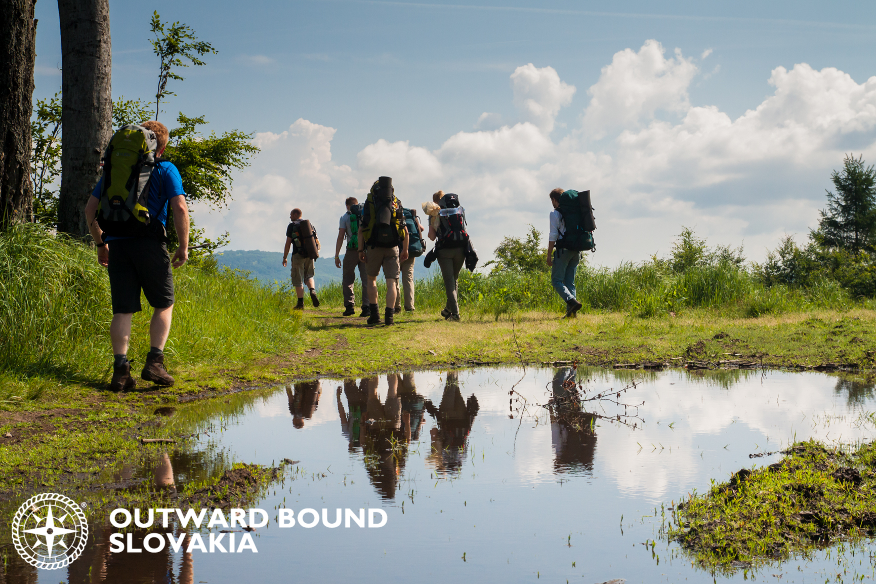 8 nových inštruktorov slovenskej školy Outward Bound na trénerskom kurze v Nízkych Tatrách